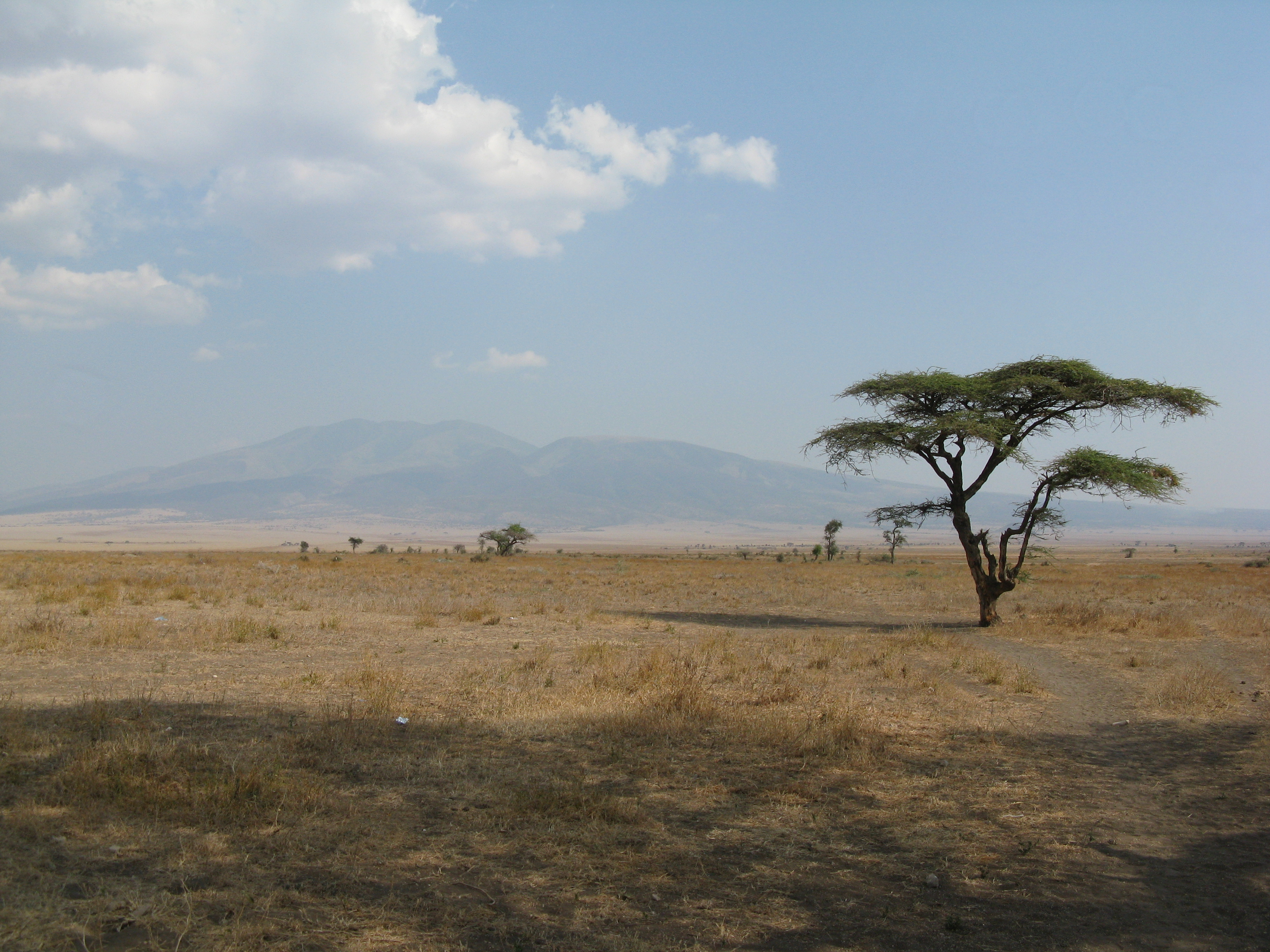 Serengetisletta i Tanzania.